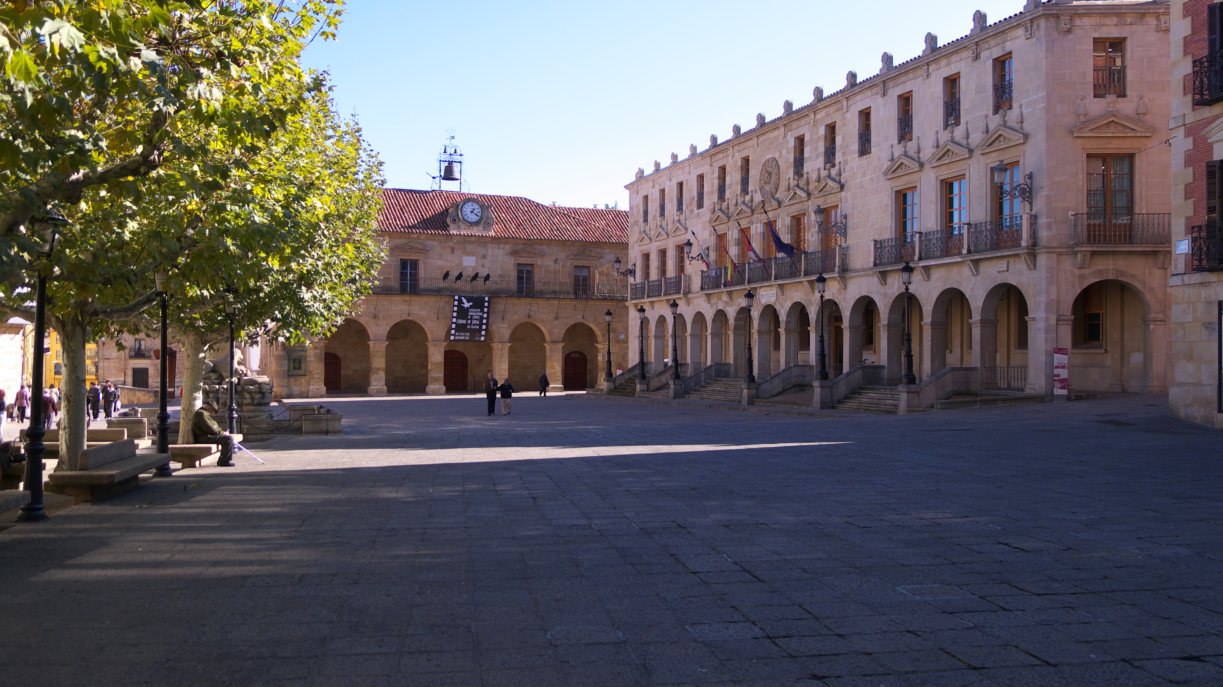 Presenta dos magníficos edificios, ambos, titulares del consistorio de la ciudad.